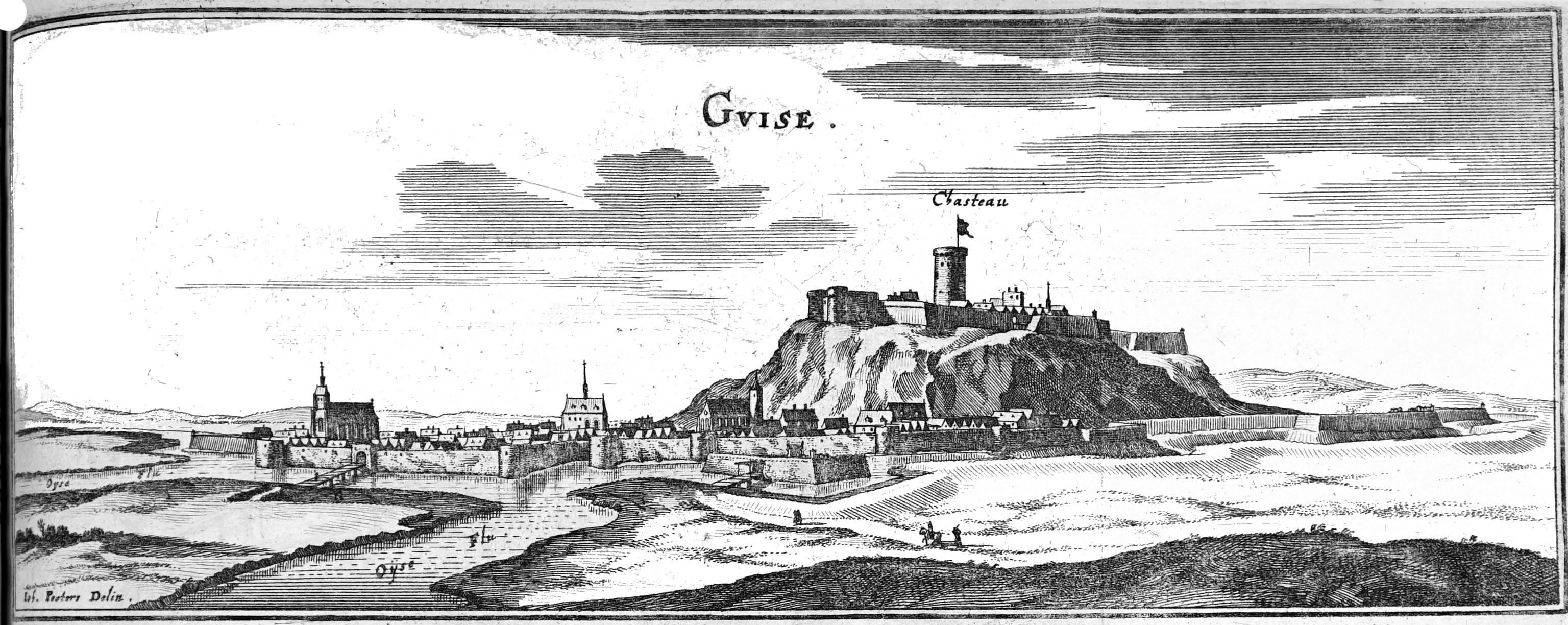 image provenant de "topographia Galliae".